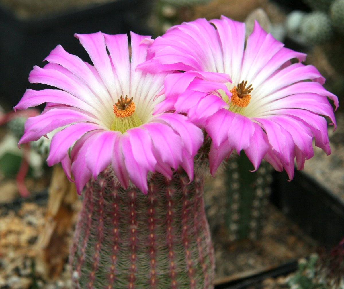 Echinocereus rigidissimus ssp. rubispinus L88.jpg